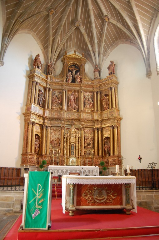 La capilla mayor es de menor altura y anchura que la nave, su planta es poligonal precedida de un tramo recto. Este se cubre con una bóveda de crucería con terceletes, mientras la ochava del ábside presenta una de crucería estrellada, con escudo de los Carvajal y símbolos de la pasión y vegetales. ( Latitud: 39º 58' 48.46 N Longitud: 6º 2' 36.43 O Altitud -srtm3:468 m (SERVIL-W)